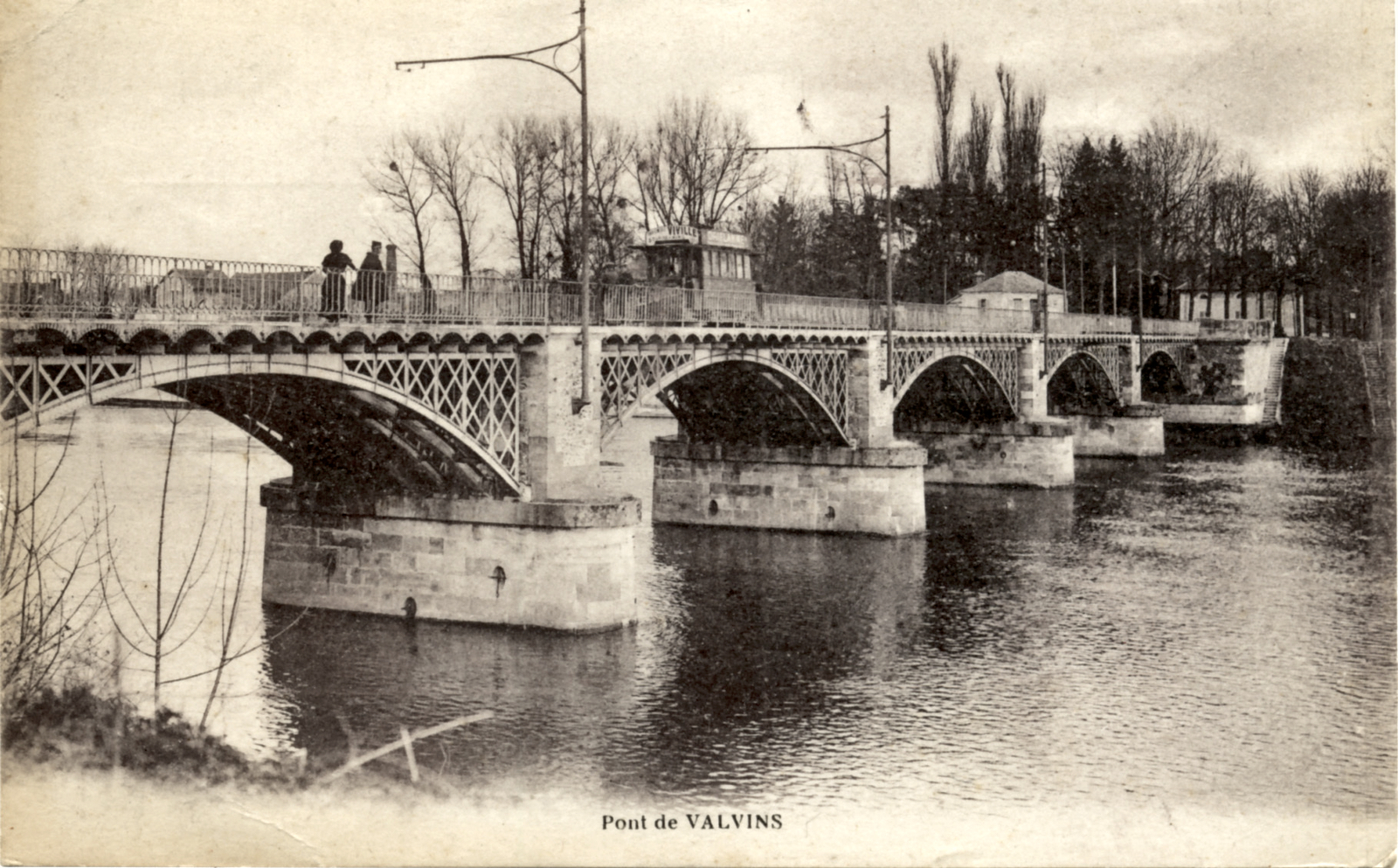 Pont de Valvins, carte postale, env. 1900